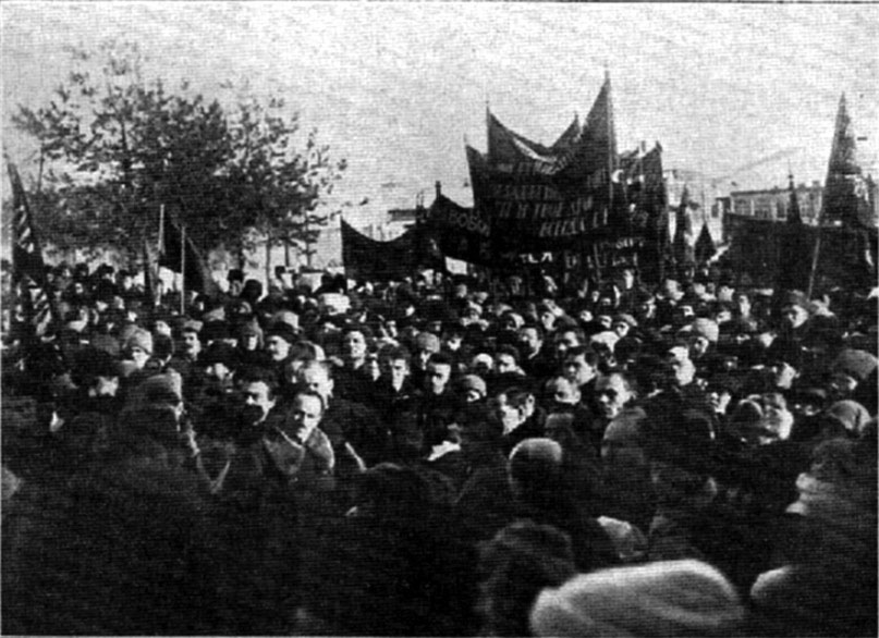 Esta imagem é parte do album de fotografias do funeral de Kropotkin publicado em 1922 pela Confederação Anarco-sindicalista Russa no exílio. Grupo de anarquistas soltos por um dia pela polícia secreta "comunista" para assistir ao funeral de Kropotkin. Vários deles, entre os quais Fanny Baron, seriam fuzilados pouco depois.